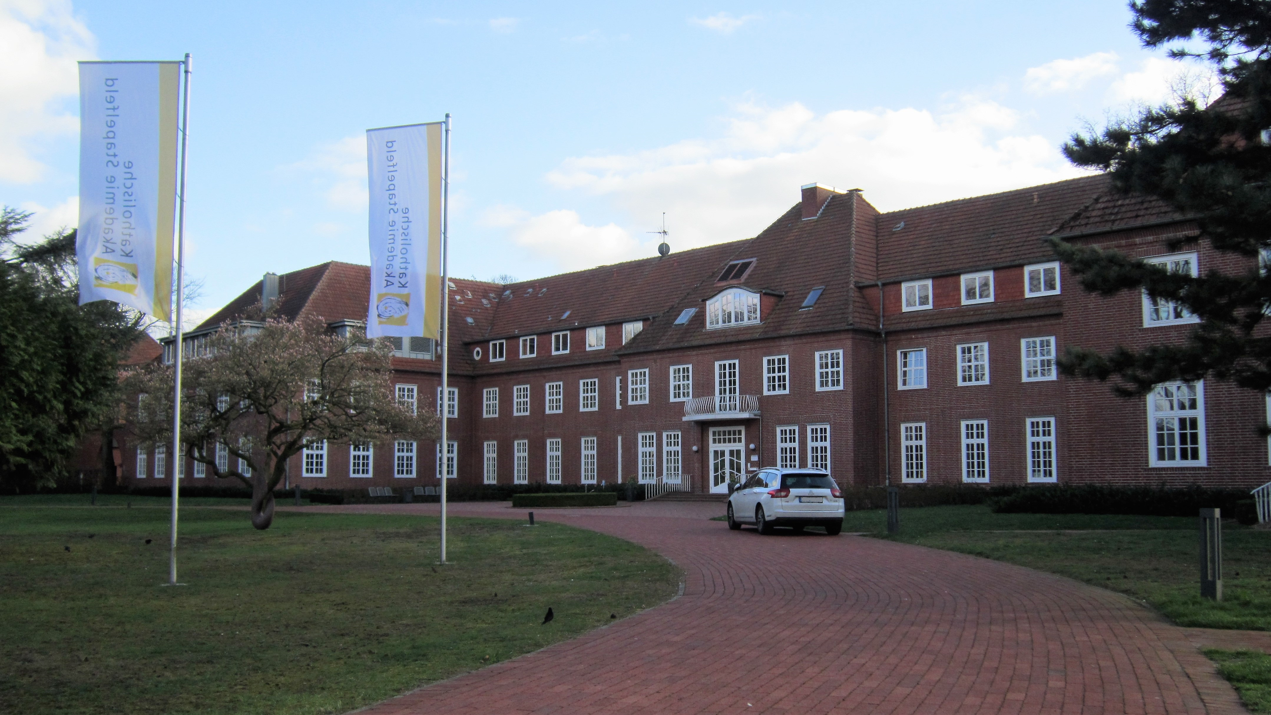 Auffahrt zum Kardinal-von-Galen-Haus (katholische Akademie und Heimvolkshochschule) in Stapelfeld